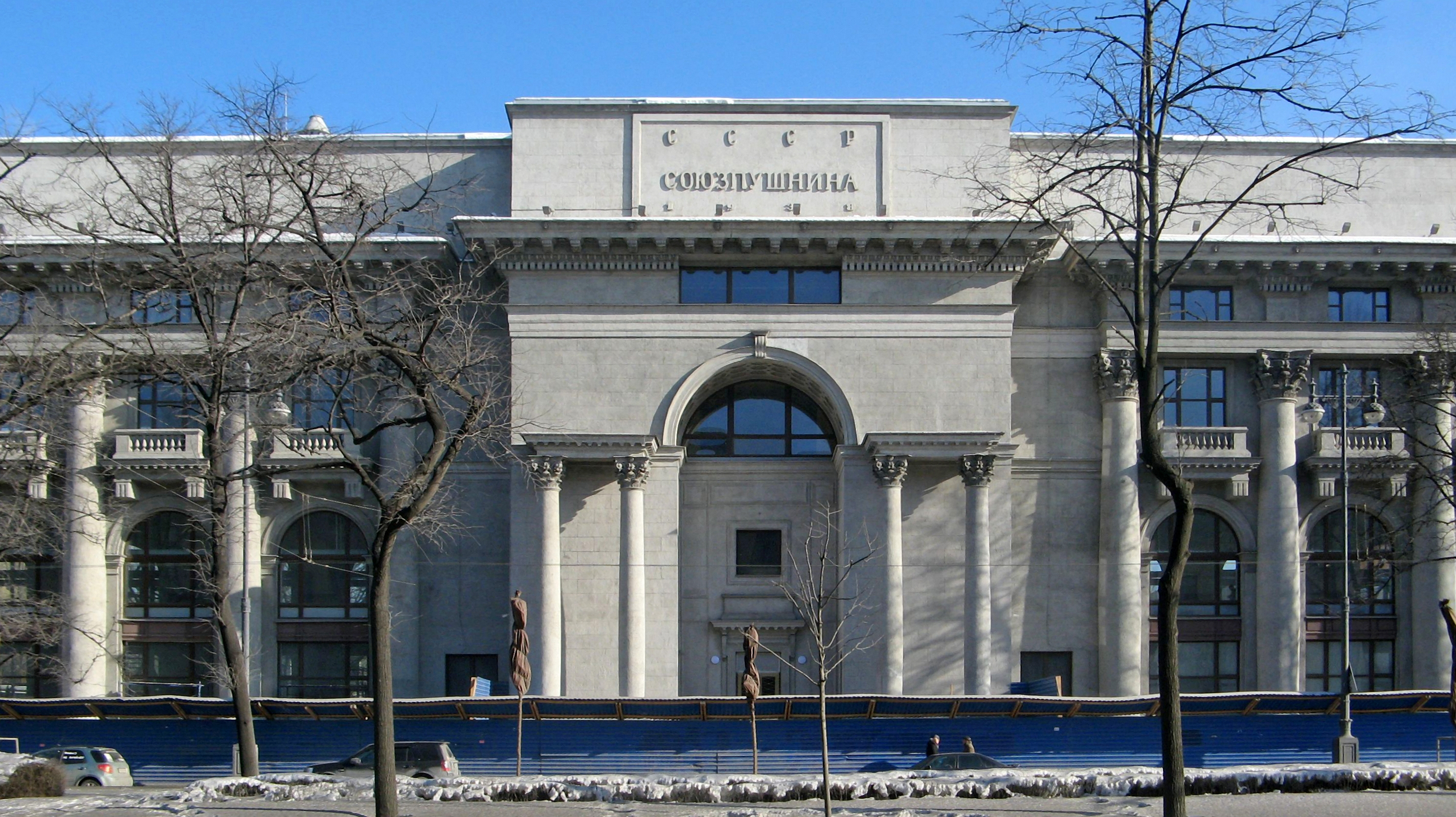 'Дворец пушнины' (Дом Союзпушнины): Московский проспект, 98 литера В, Московский район, Санкт-Петербург